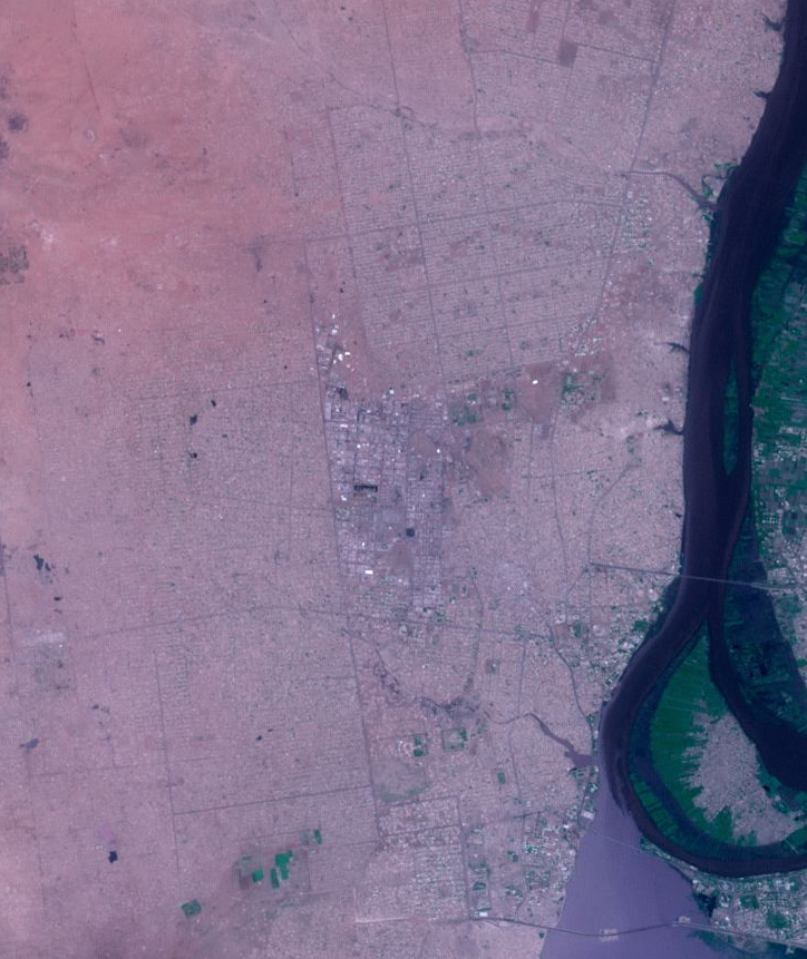 صورة جوية لمدينة أم درمان السودانية